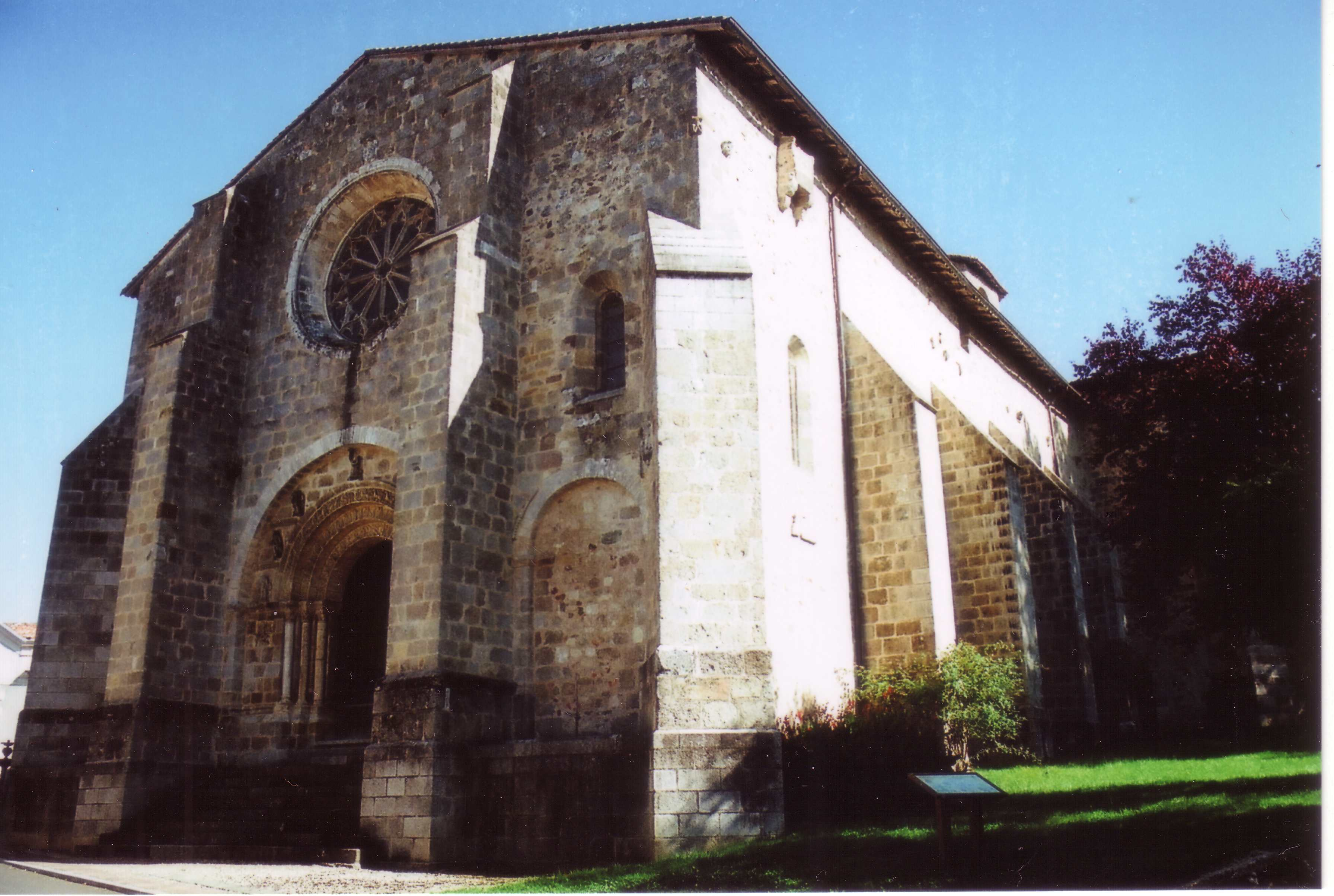 Façade de l’église abbatiale de Bussière-Badil